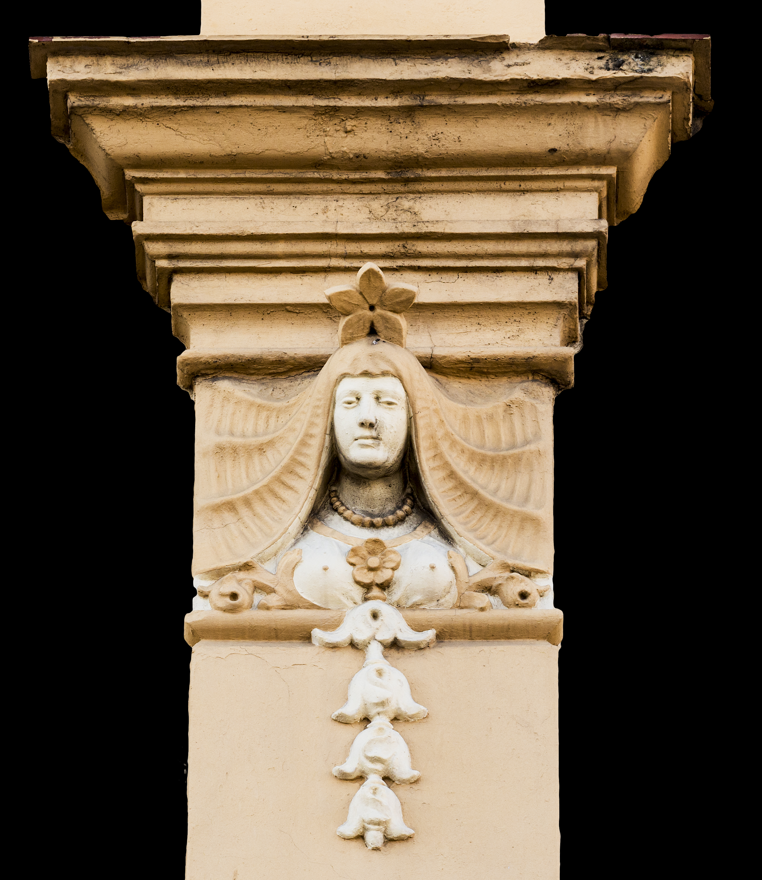 Relieve sobre pilastra en Edificio modernista "Casa La Pilarica". Modernismo. Melilla (1910-1911).